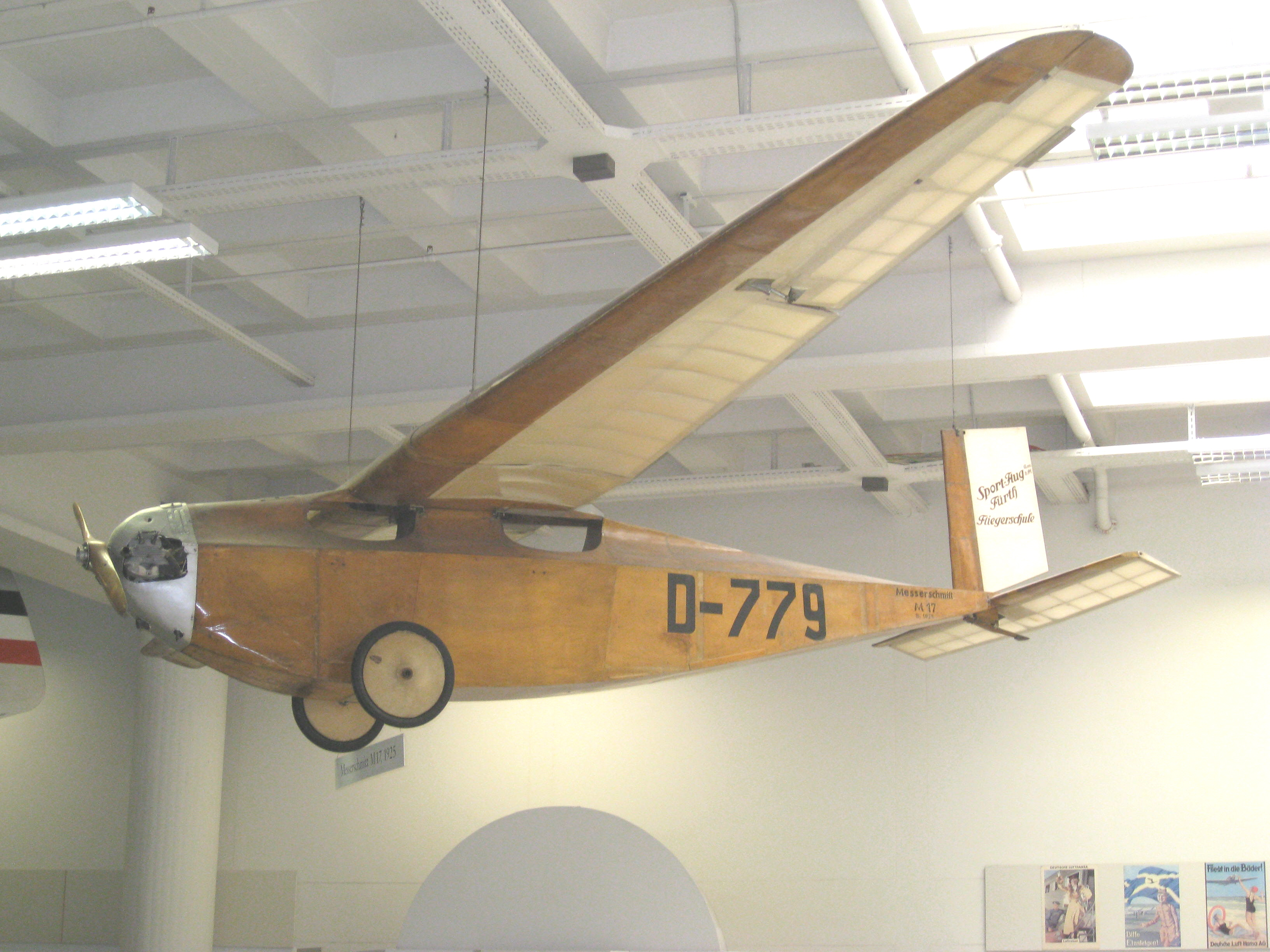 Messerschmitt M17 aircraft at Deutschesmuseum Munich